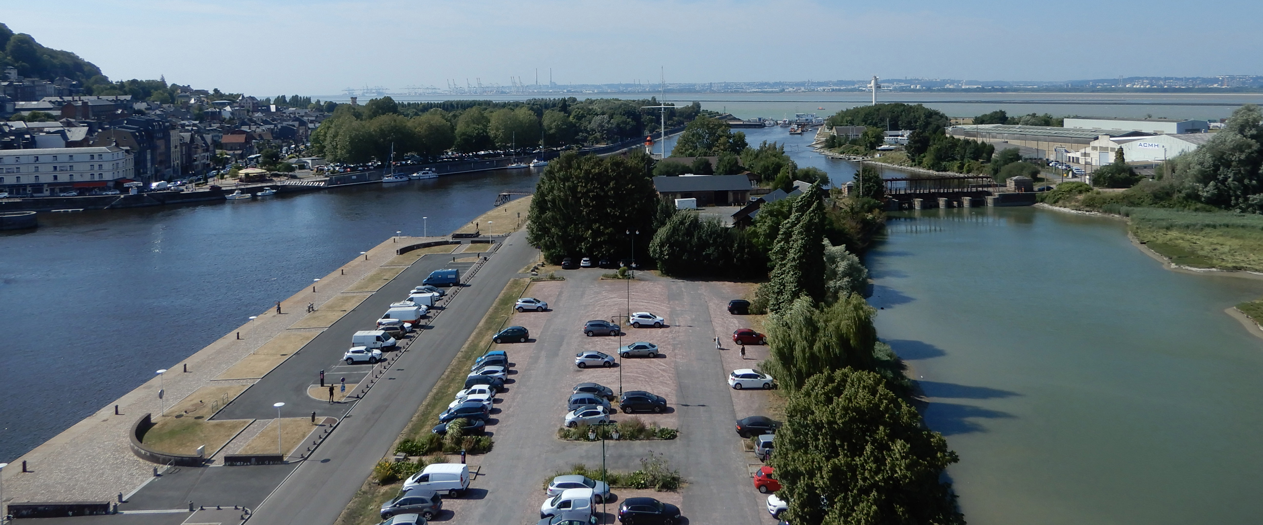 Honfleur, entrée du port, été 2018